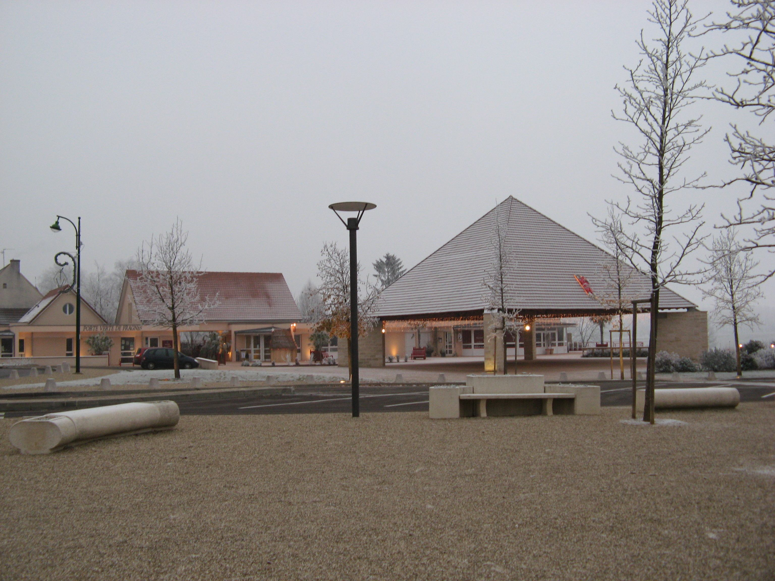 La halle et les commerces